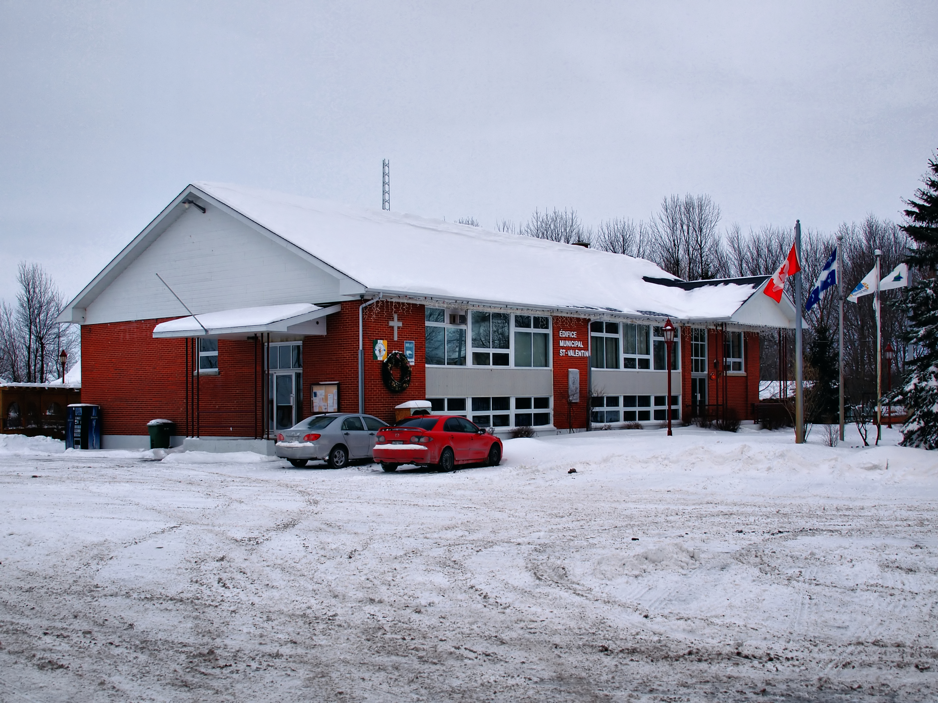 Saint-Valentin - La Mairie